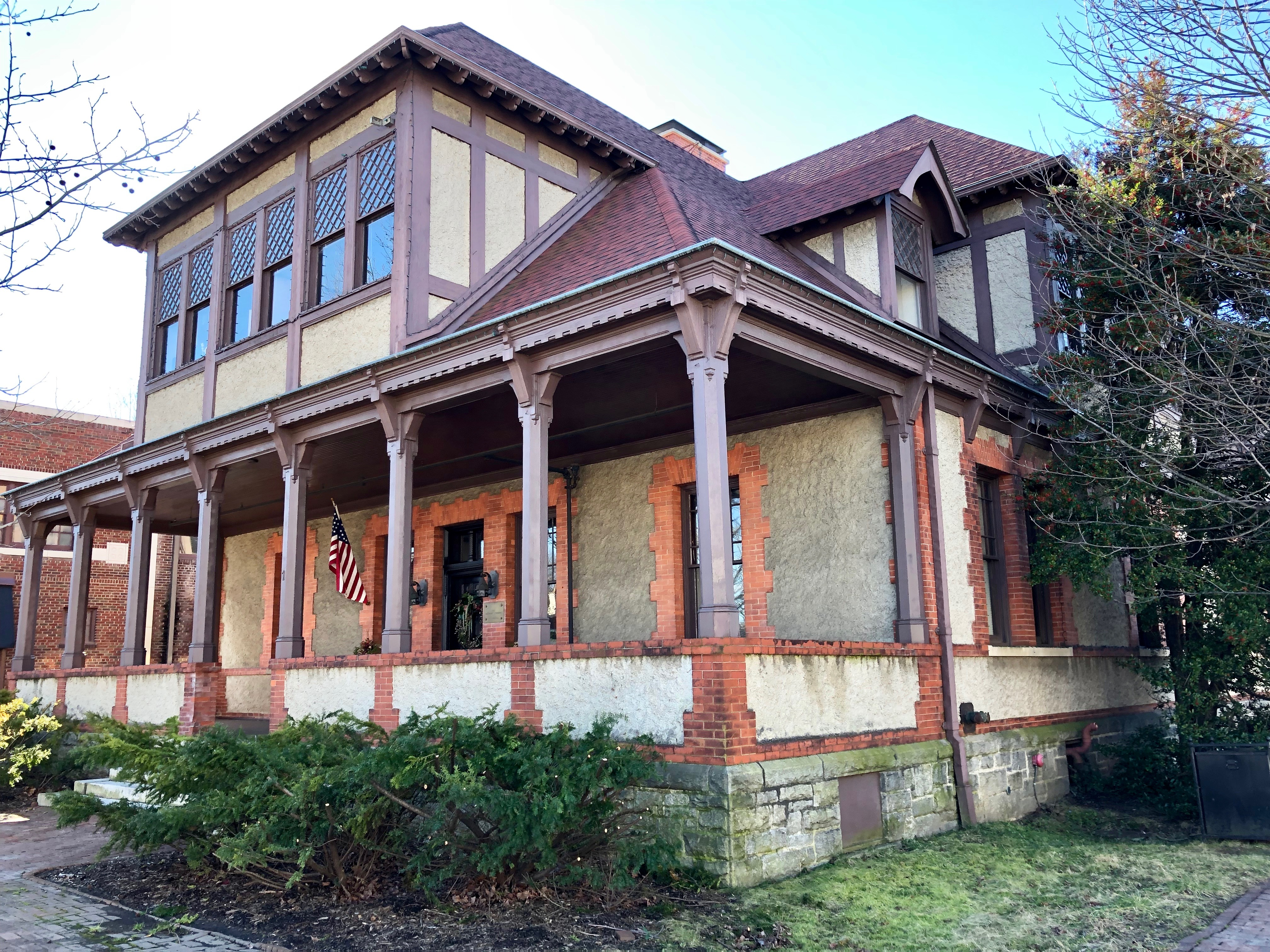 Biltmore Plaza, Biltmore Village, NC